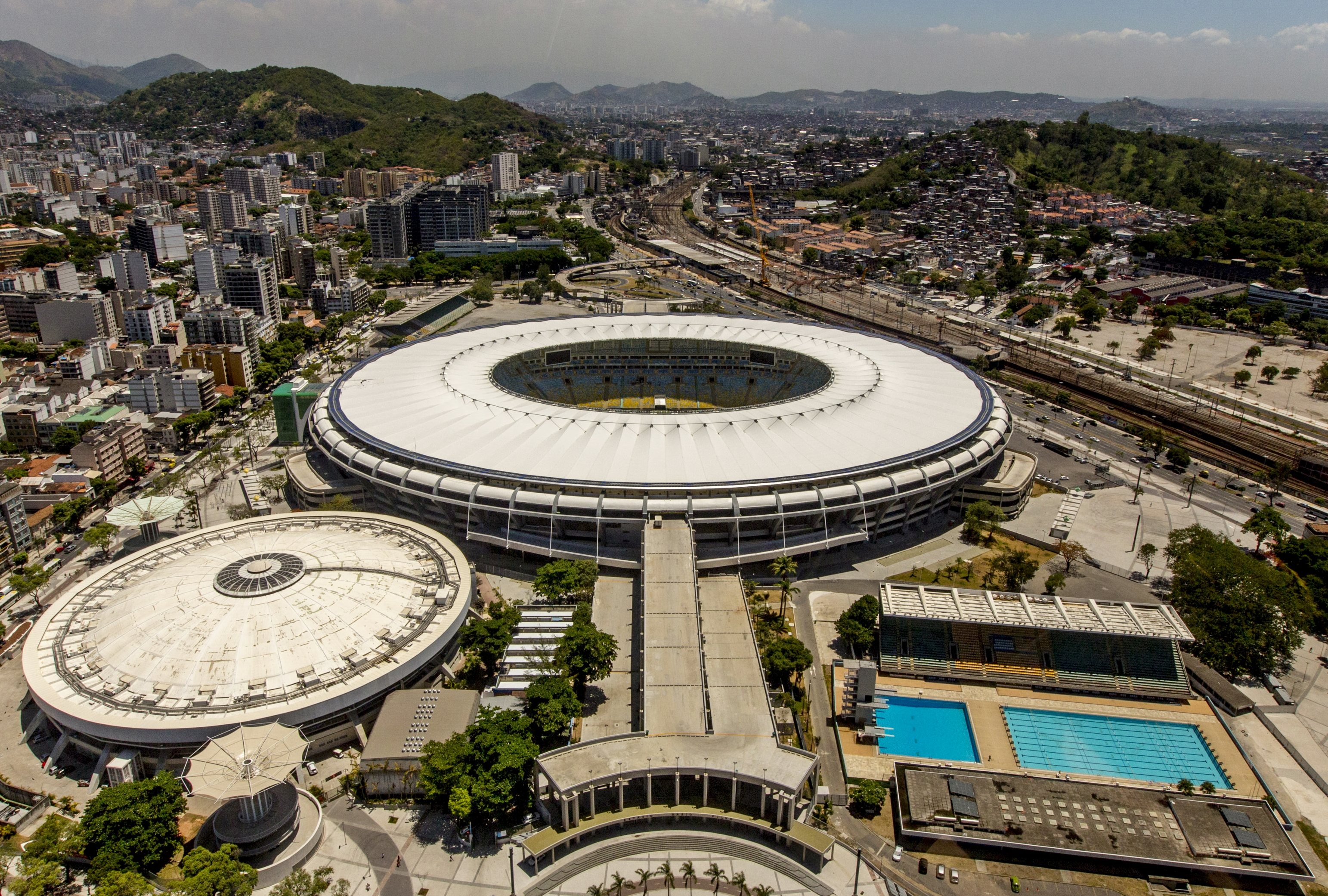 Estádio Jornalista Mário Filho, mais conhecido como Maracanã. Foto de fevereiro de 2014.